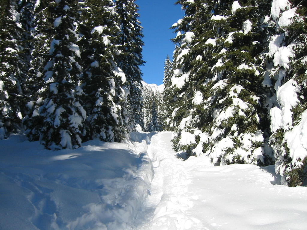 Snežna gaz v pokljuškem gozdu.